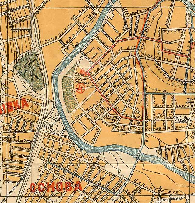 Плян міськомгоспу 1924 року